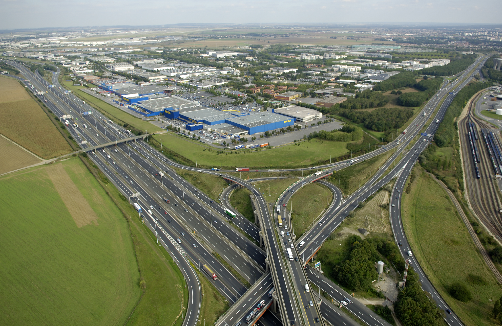 Échangeur A1-A104 et Paris-Nord II à Gonesse (France).